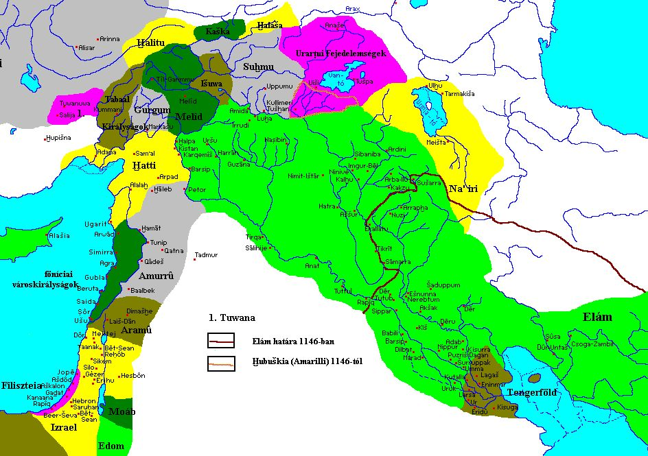 Újhettita királyságok és Asszíria az i. e. 12. században (i. e. 1146-ig Elám birtokolta egész Mezopotámiát)